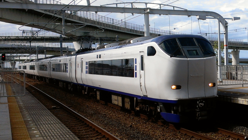 Kansai A.P Ltd.Exp